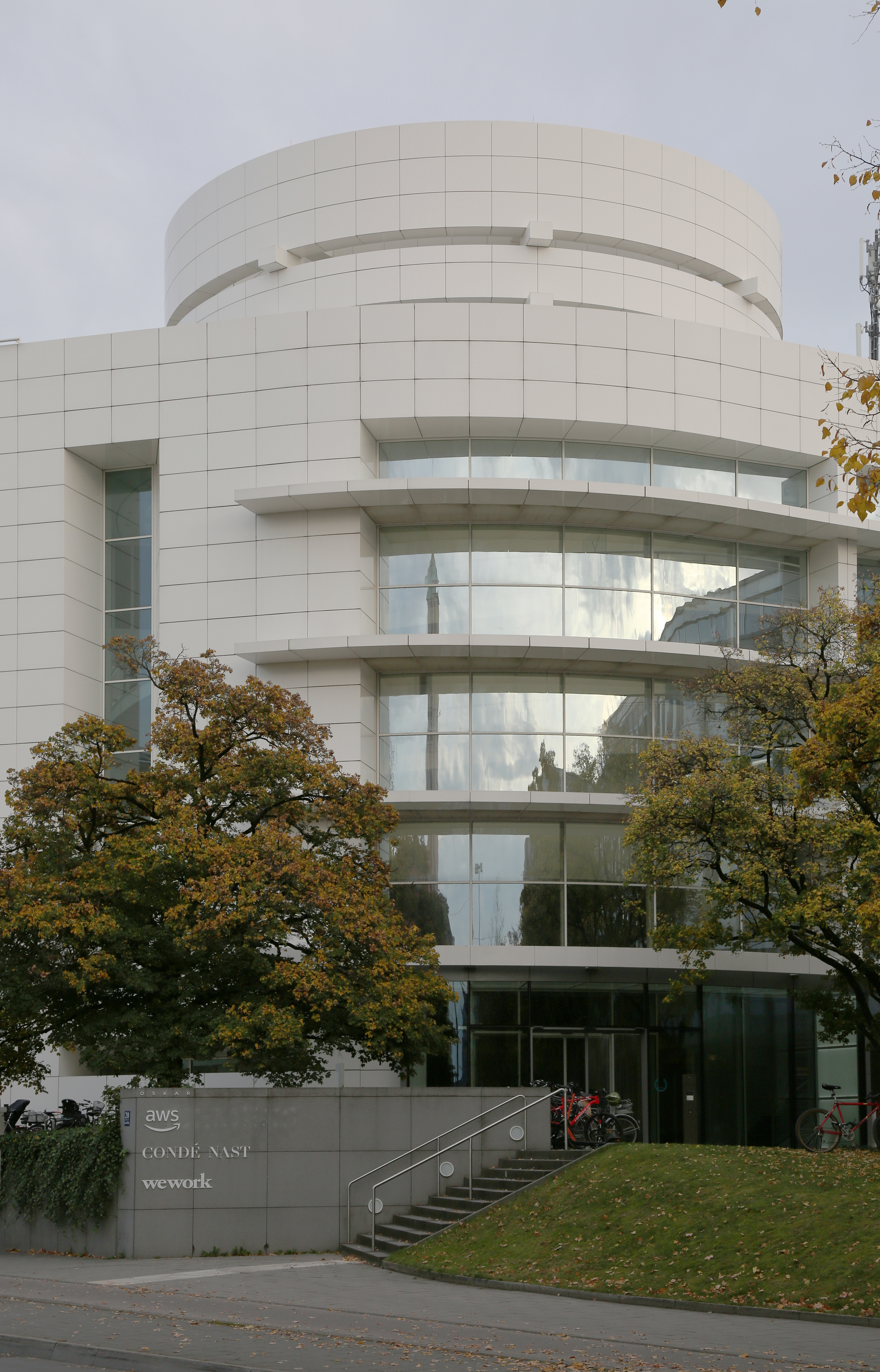 Oskar-von-Miller-Ring 20 , München. Ein Bürogebäude von Architekt Richard Meier aus dem Jahr 1999. Ursprünglich für die Siemens AG errichtet, im Jahr 2019 Sitz von Conde-Nast, Amazon Web Services und WeWorks. Das Bild zeigt einen gebogenen Schild, der die Eingangsrotunde umschließt.